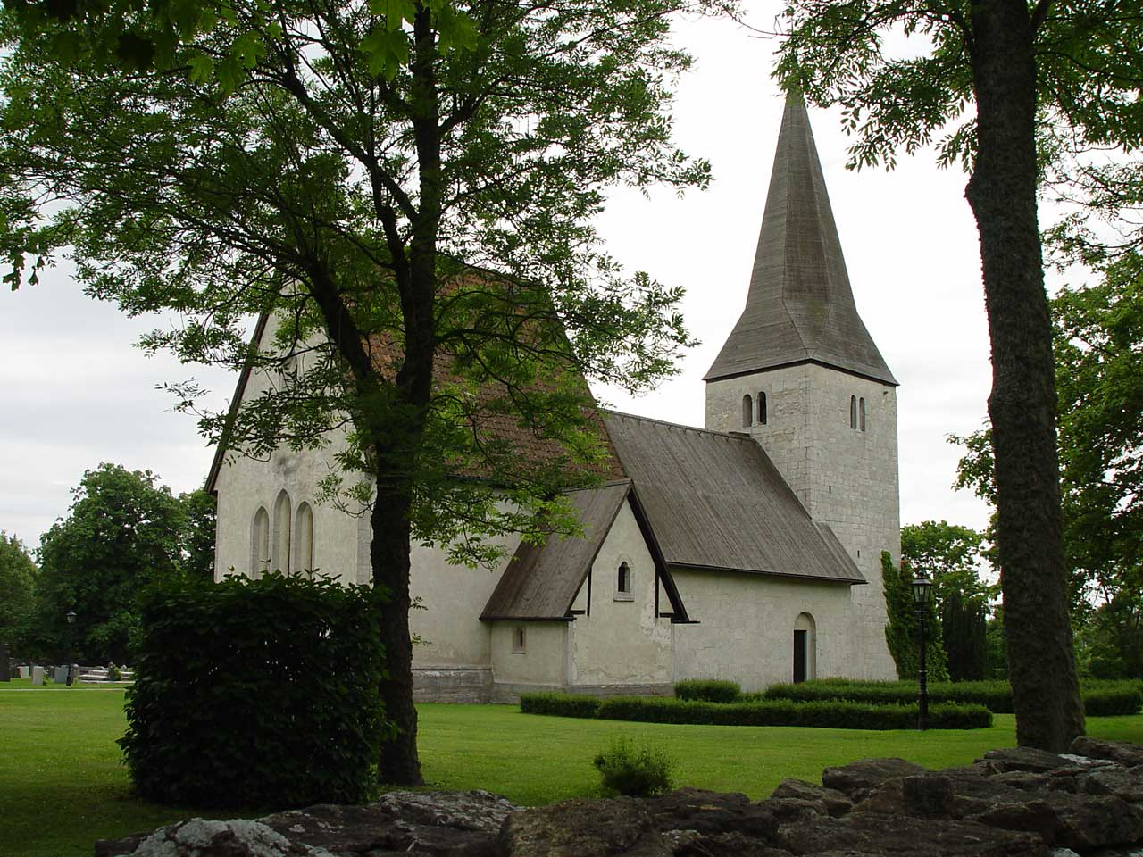 Fröjel-Kirche auf Gotland. Langhaus (12.Jh.), Turm (Anfang 13.Jh.), Chor (um 1300)